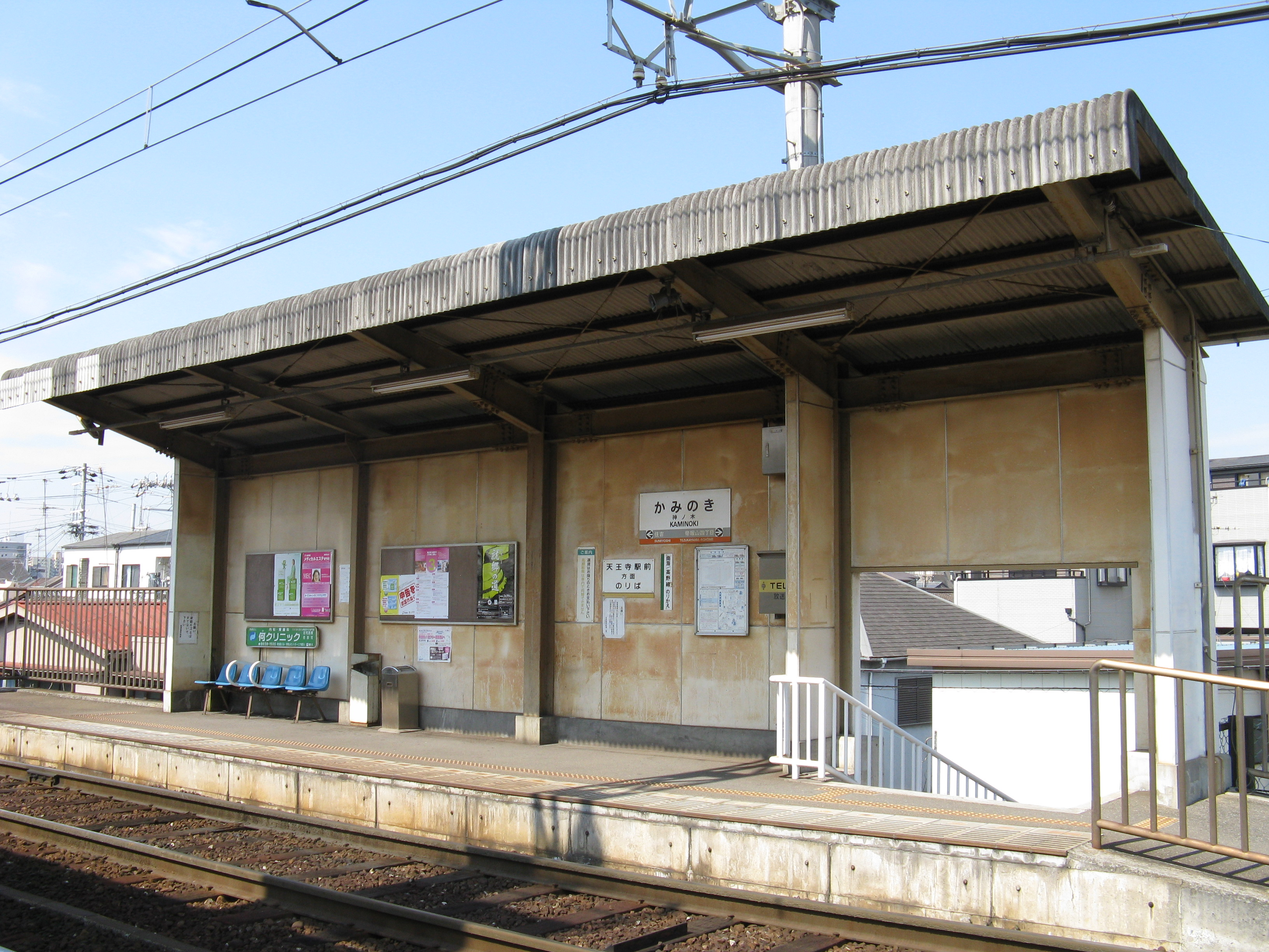 神ノ木駅